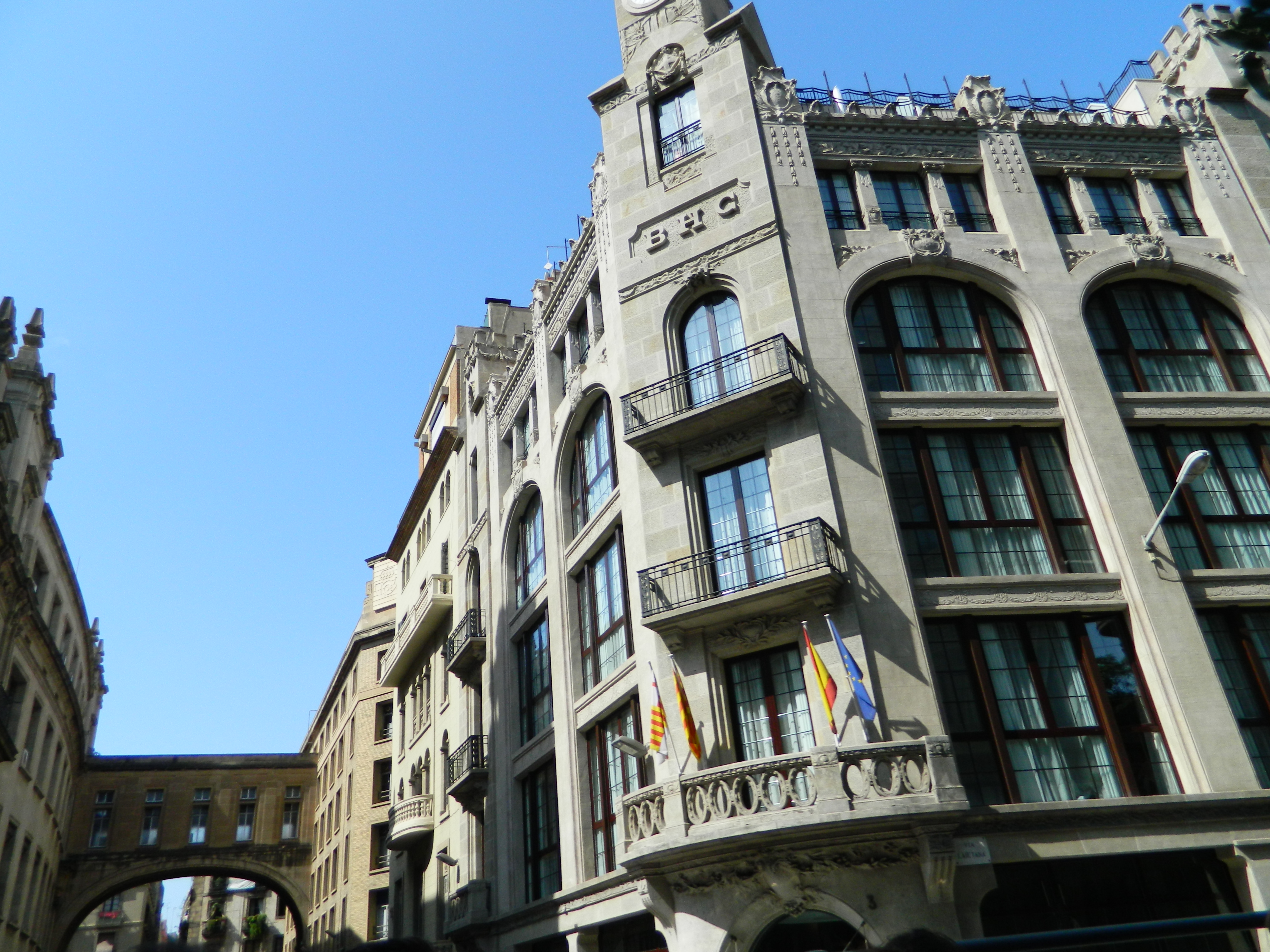 Barcelona